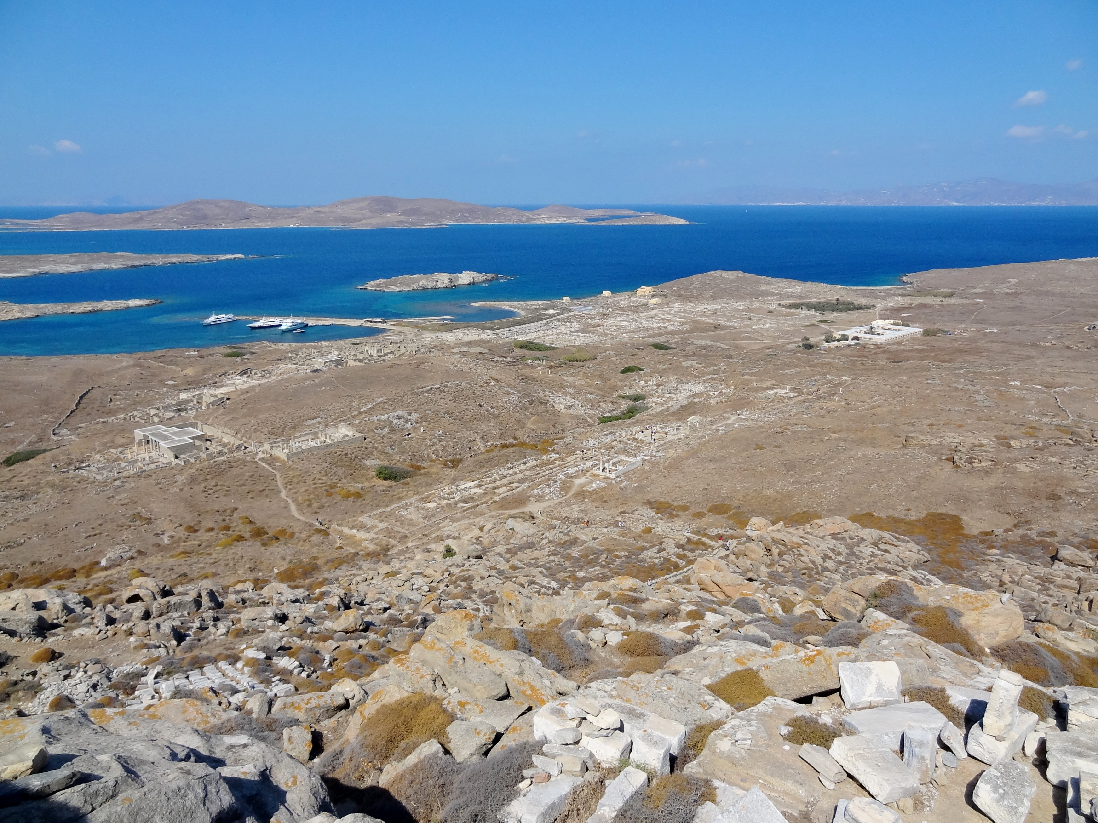 Archäologische Ausgrabungsstätte von Delos vom Berg Kynthos aus gesehen, Kykladen, Griechenland